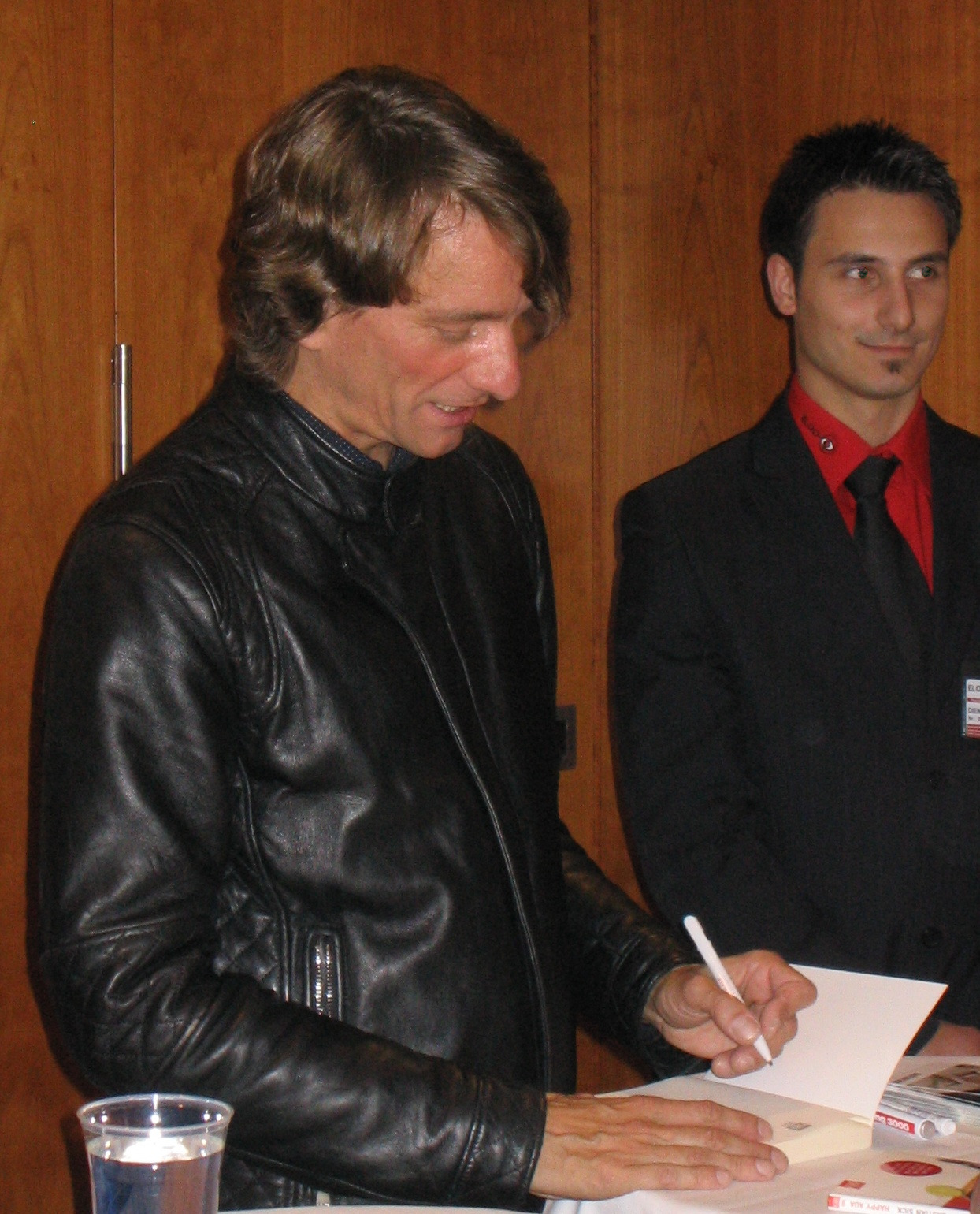 Bastian Sick nach seinem Auftritt im Freiburger Konzerthaus